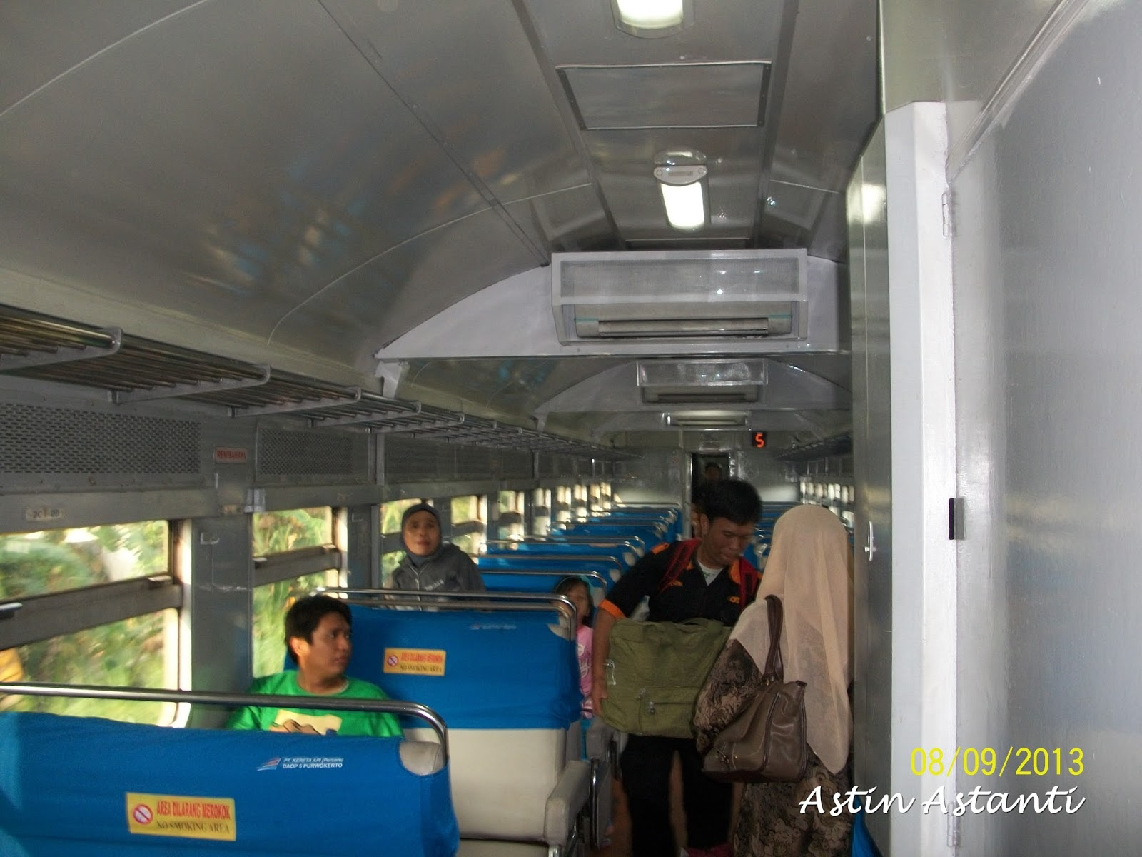 KA Sawunggalih utama